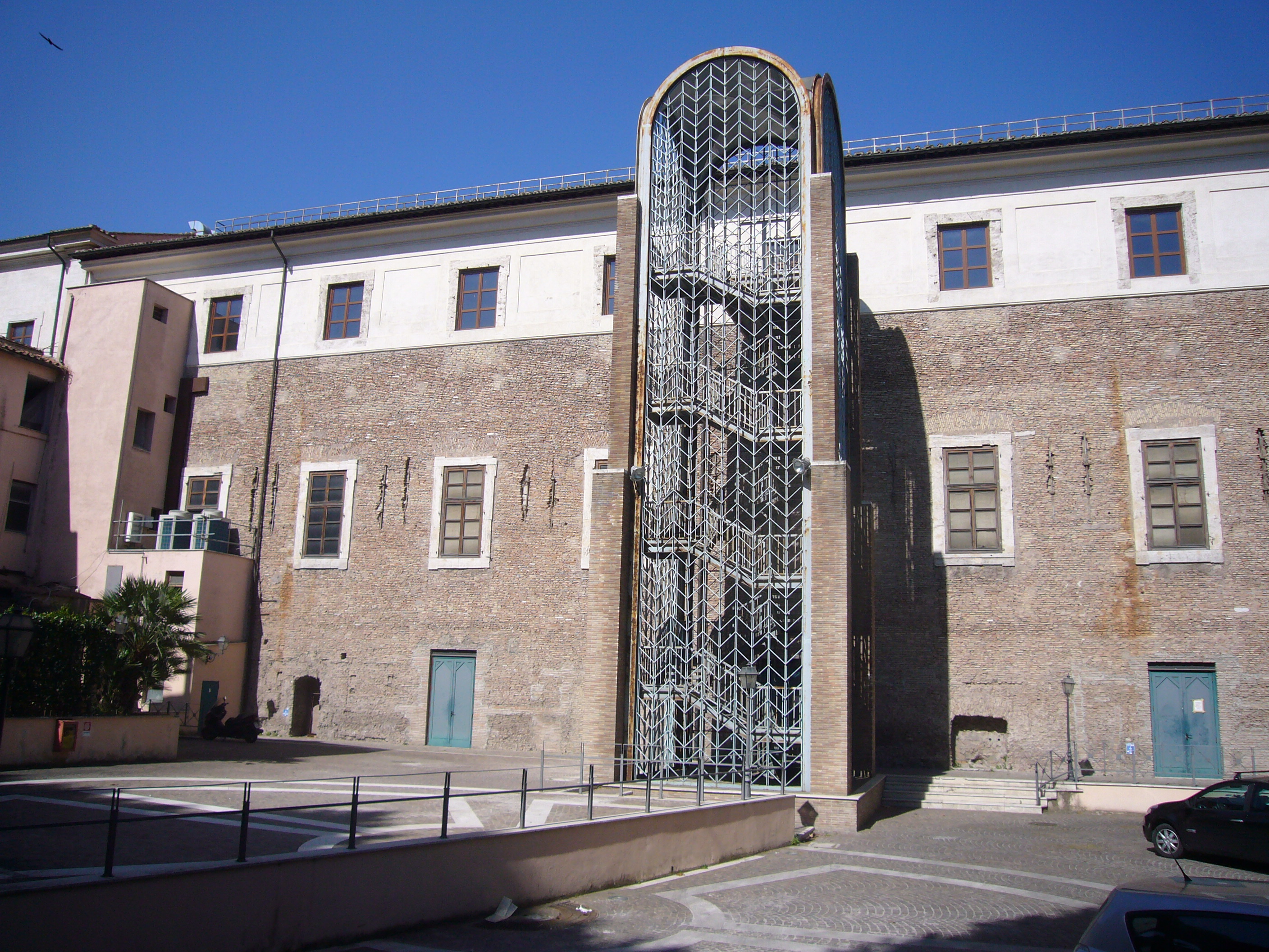 Roma, Ospedale delle donne a s. Giovanni. Scala di sicurezza.